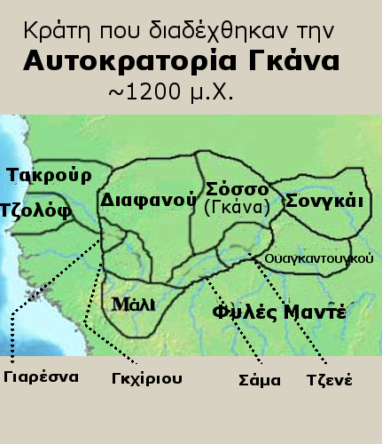 Κράτη που διαδέχθηκαν την Αυτοκρατορία Γκάνα το 1200 μ.Χ.